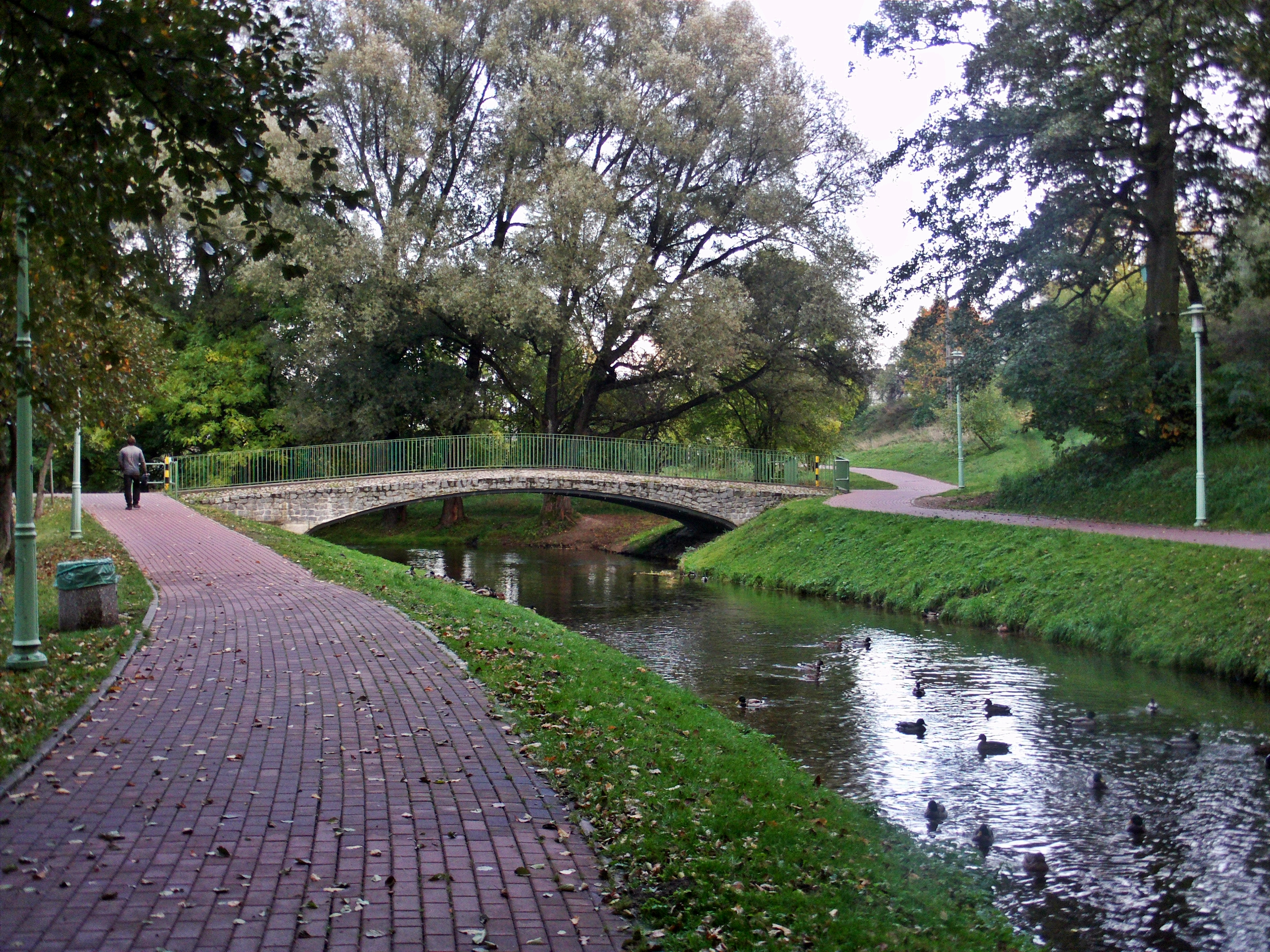 Bulwary nad rzeką Czarna Hańcza w Suwałkach.